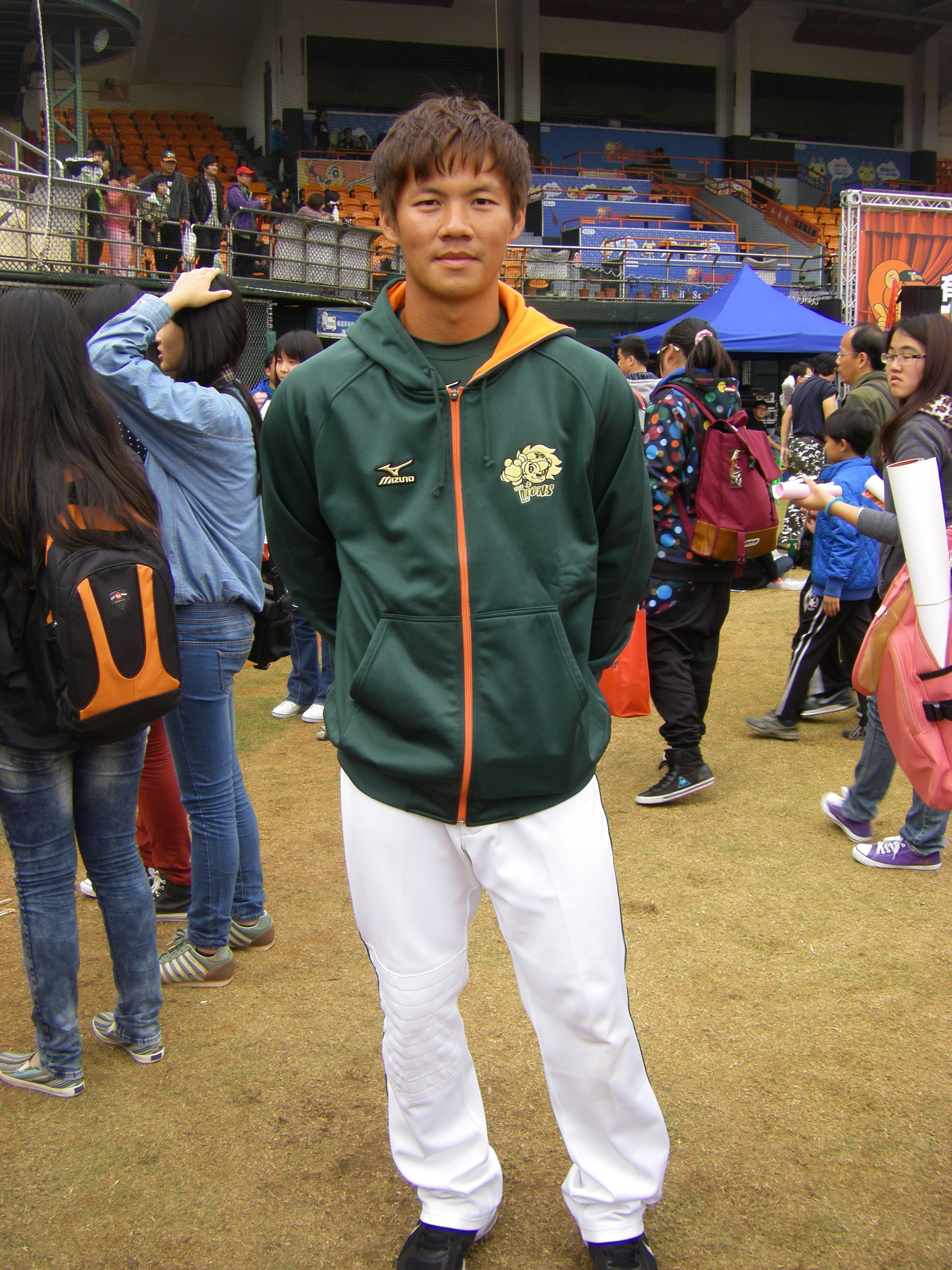 中文（台灣）: 羅國龍在2014統一獅有你真好同樂會